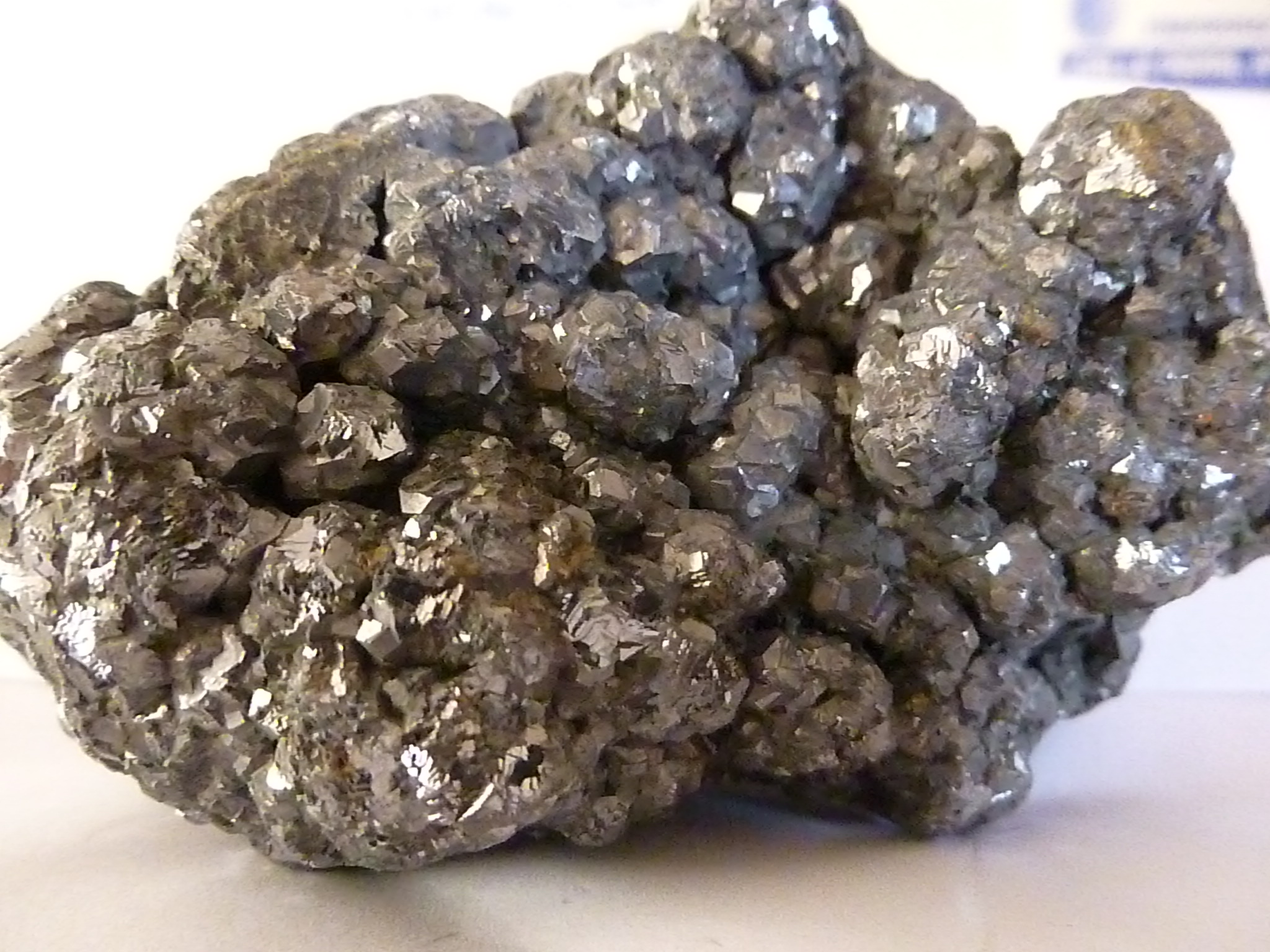 Galena Cristalizada, procedente de la Mina Tambogrande, Piura, Perú